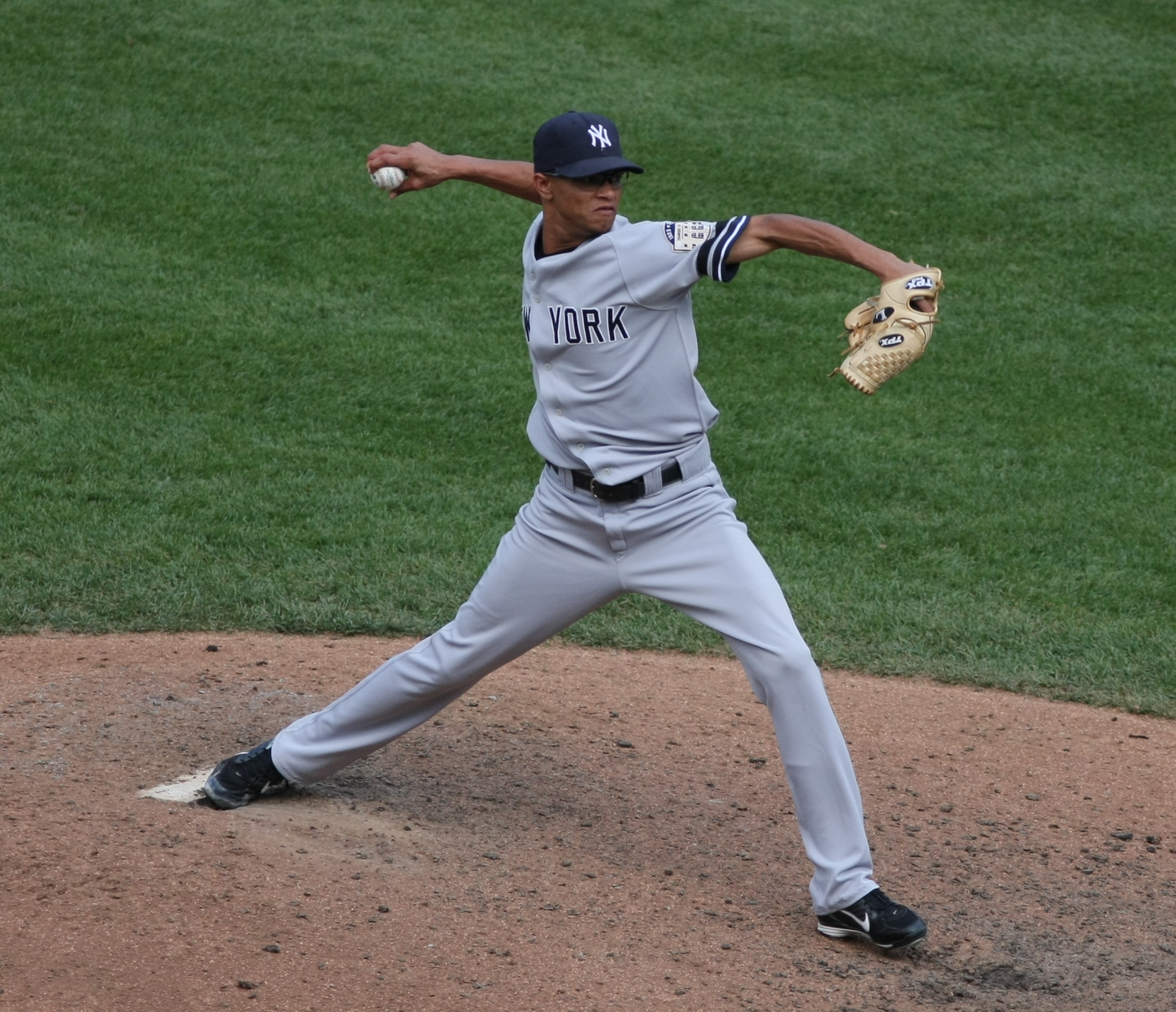 Edwar Ramírez